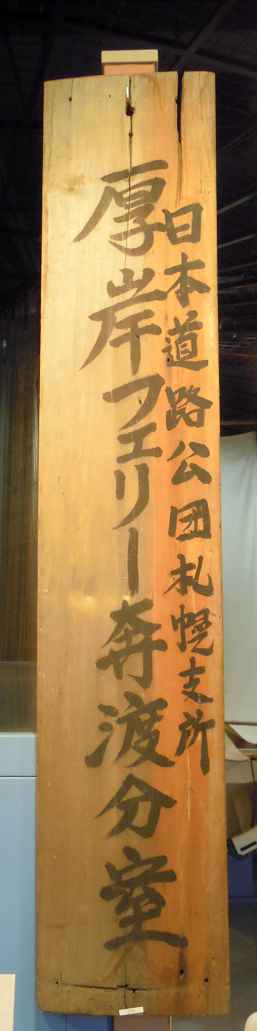 厚岸町海事記念館に保存されている、かつて存在した日本道路公団「厚岸フェリー」の奔渡分室の看板